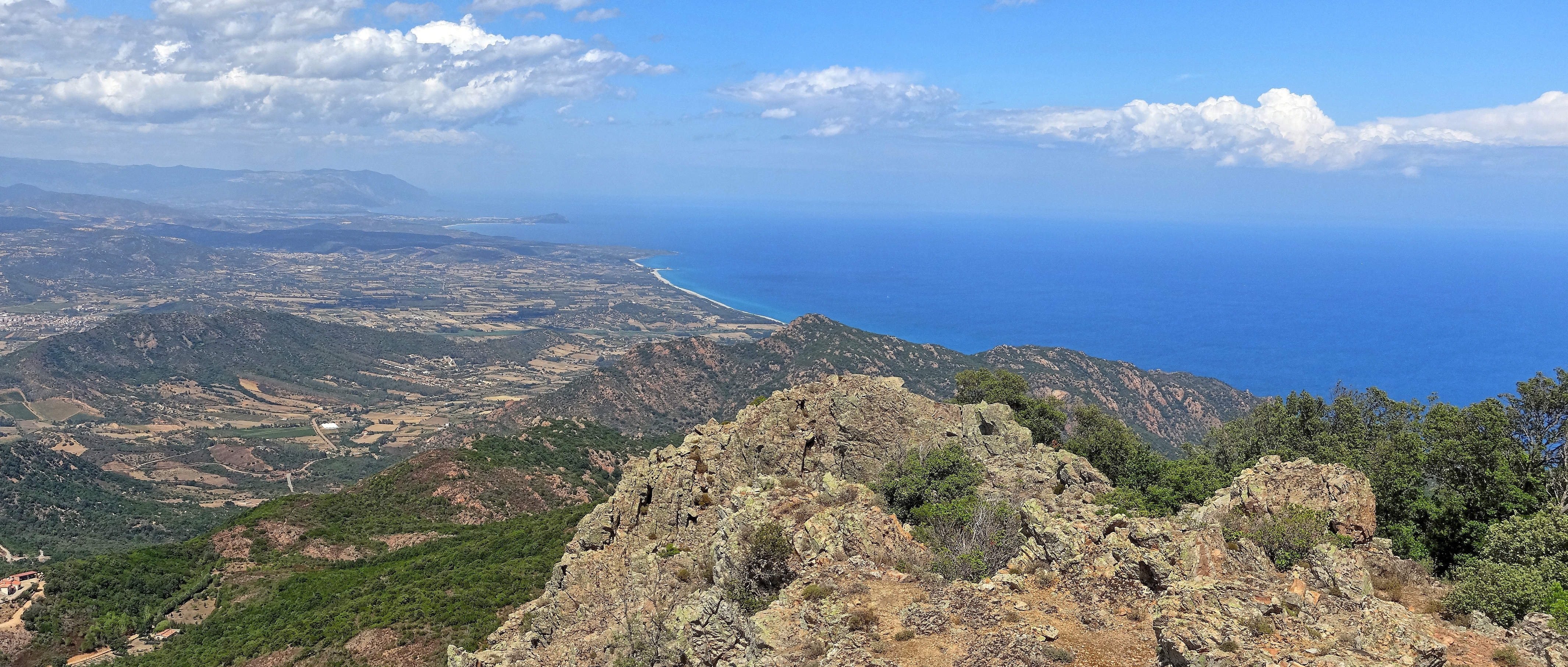 Blick vom Gipfel des Monte Ferru (875 m, östlich von Tertenia) nach Norden über die Ogliastra. Etwa mittig: Torre di Bari. Im Hintergrund die Ausläufer des Supramonte und der Hafen von Arbatax.